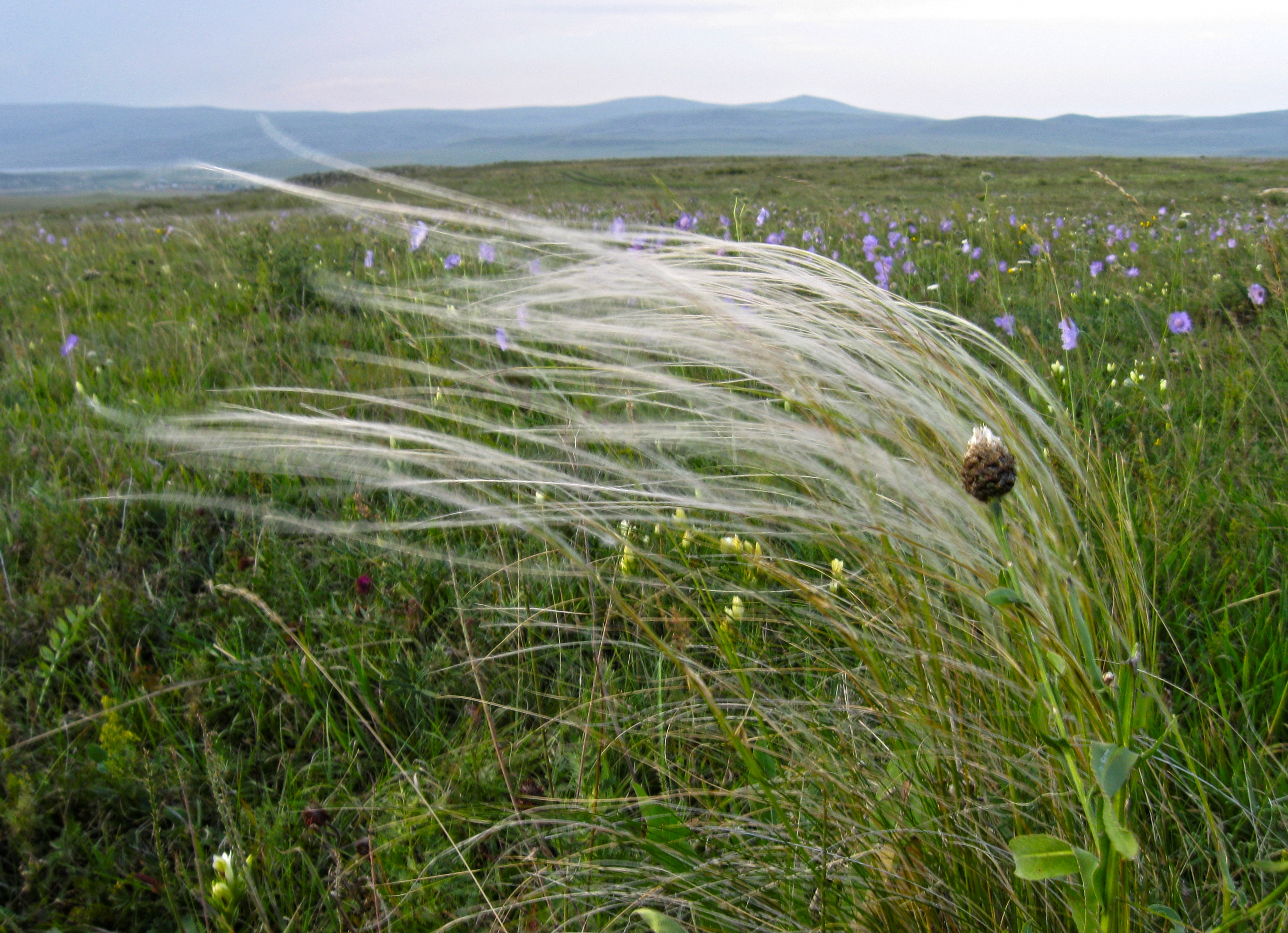 Ամասիա գյուղից 3 կմ հս-արմ